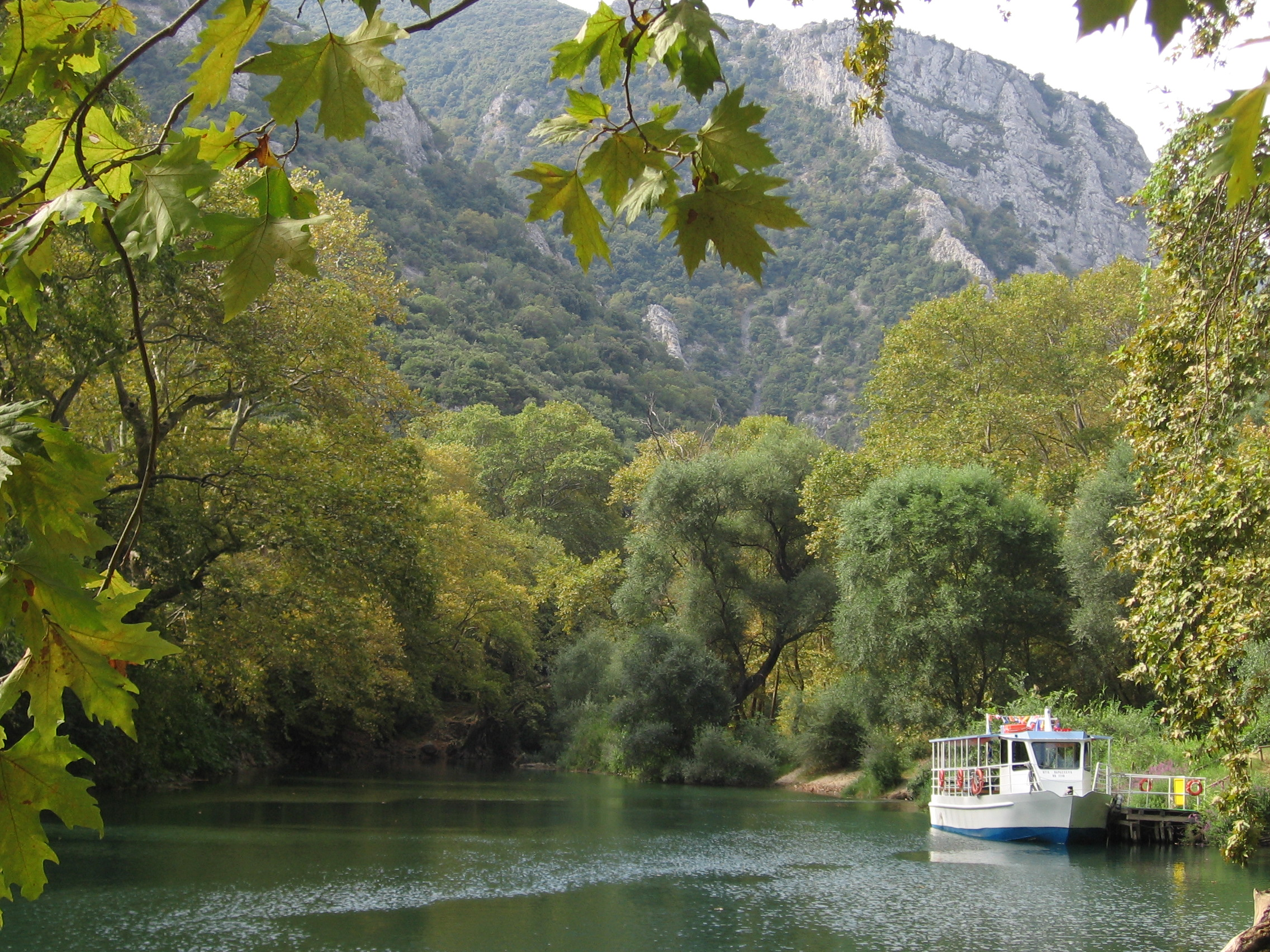 Beschreibung: Tempe (Griechenland)). Quelle: eigene Aufnahme am 15. September2006 Fotograf: Roman Klementschitz, Wien